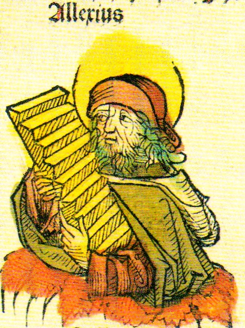 Porträt von Alexius der Bekenner